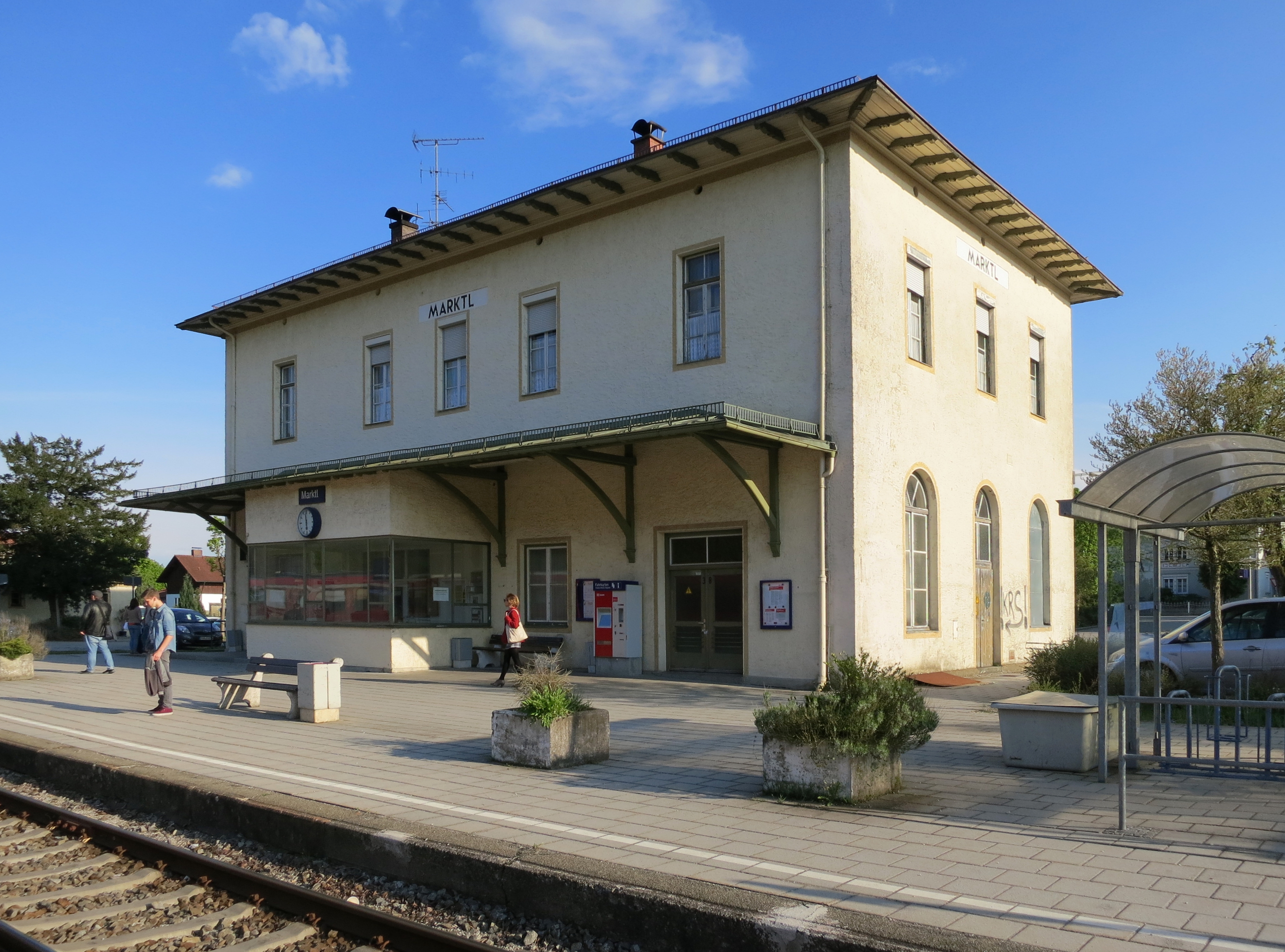 Empfangsgebäude des Bahnhofs Marktl von der Gleisseite